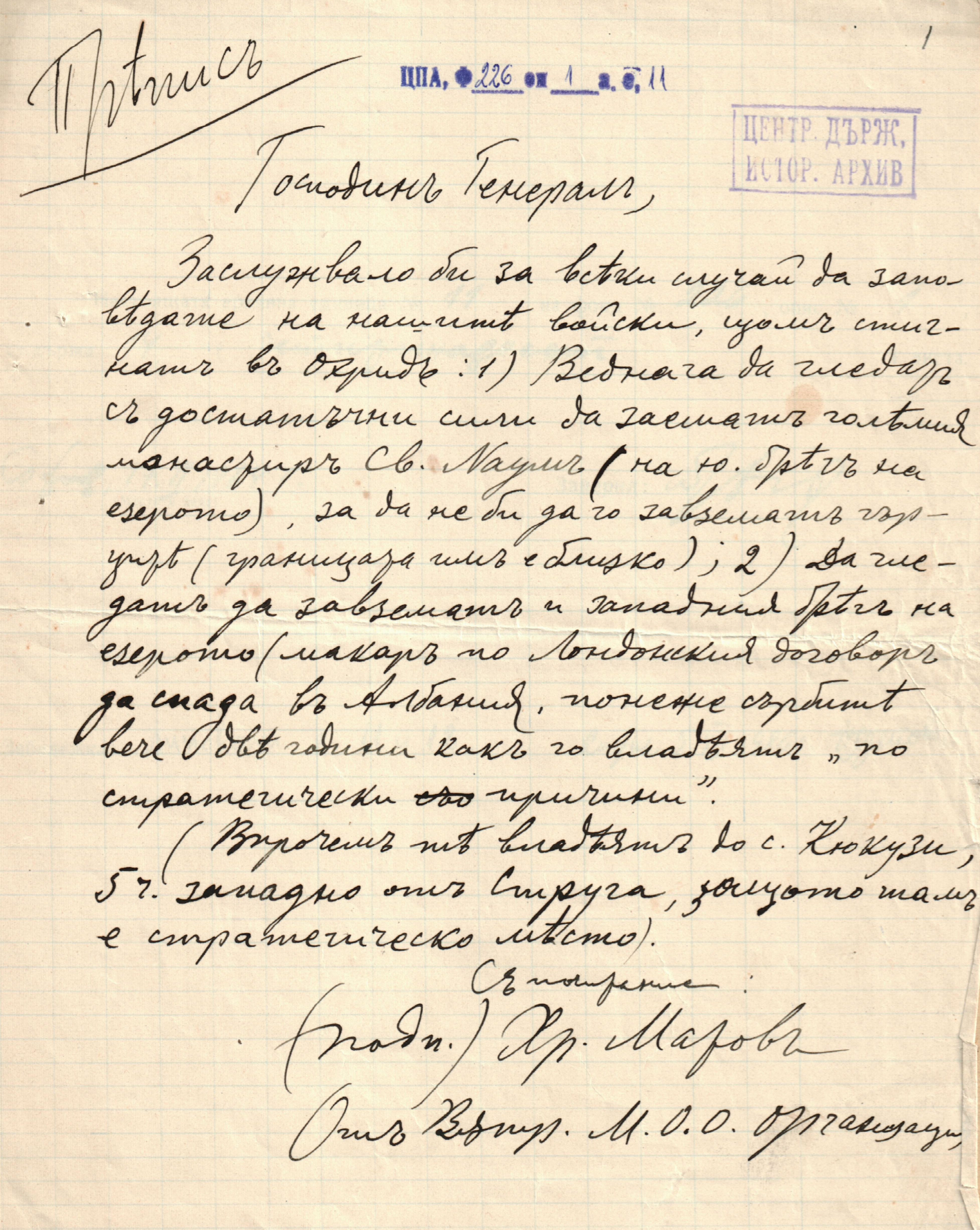 Писмо от Христо Матов от името на ВМОРО до командващия I армия генерал Климент Бояджиев с препоръка, след като българската войска влезе в Охрид да завладее и манастира „Свети Наум“, тъй като има опасност да го овладеят гърците, както и западния бряг на Охридското езеро, макар по Лондонския договор да е отстъпен на Албания, ноември 1915 г..